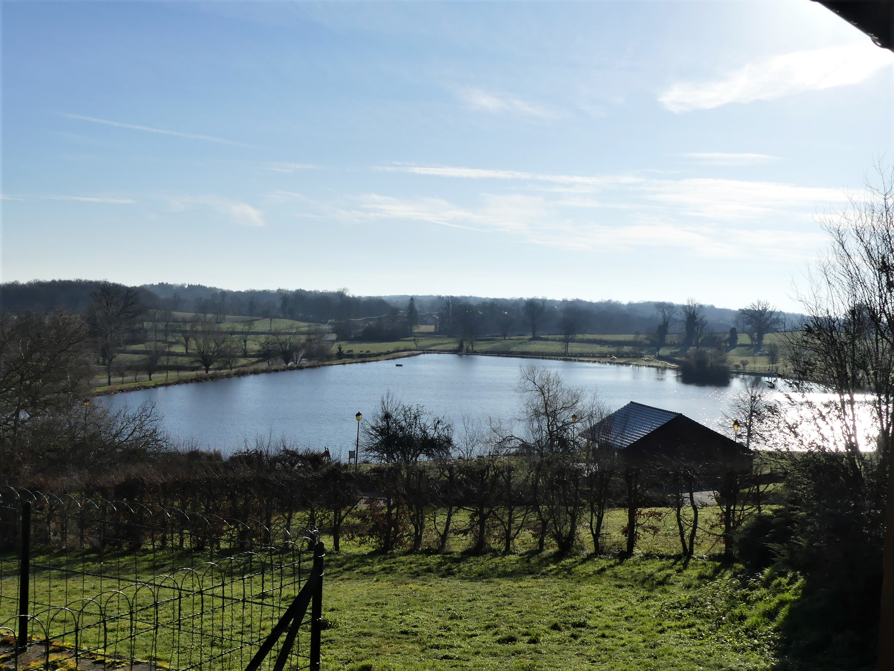 L'étang de Cressat, Creuse, France.